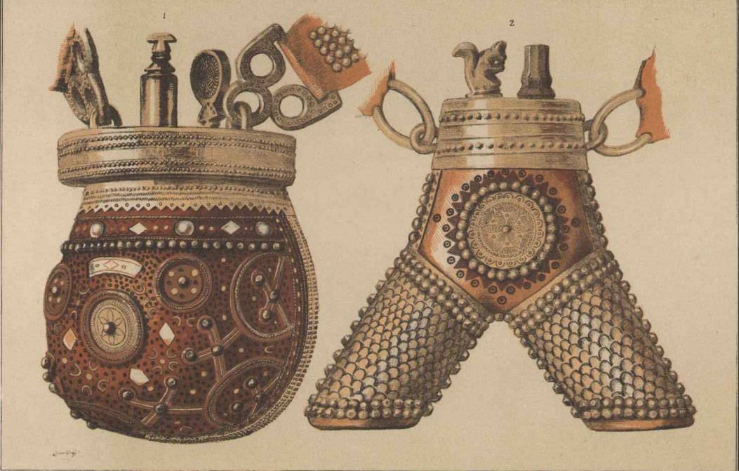 Сторінка з видання "Взори промислу домашнього. Металеві вироби селян на Русі" табл. X 1 - кругла порохівниця 2 - рогова порохівниця